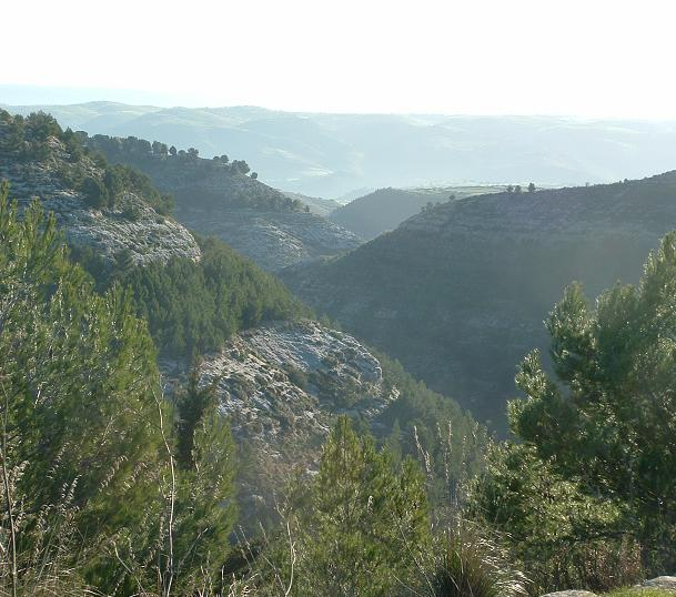 Paesaggio Ibleo, Cava Volpe